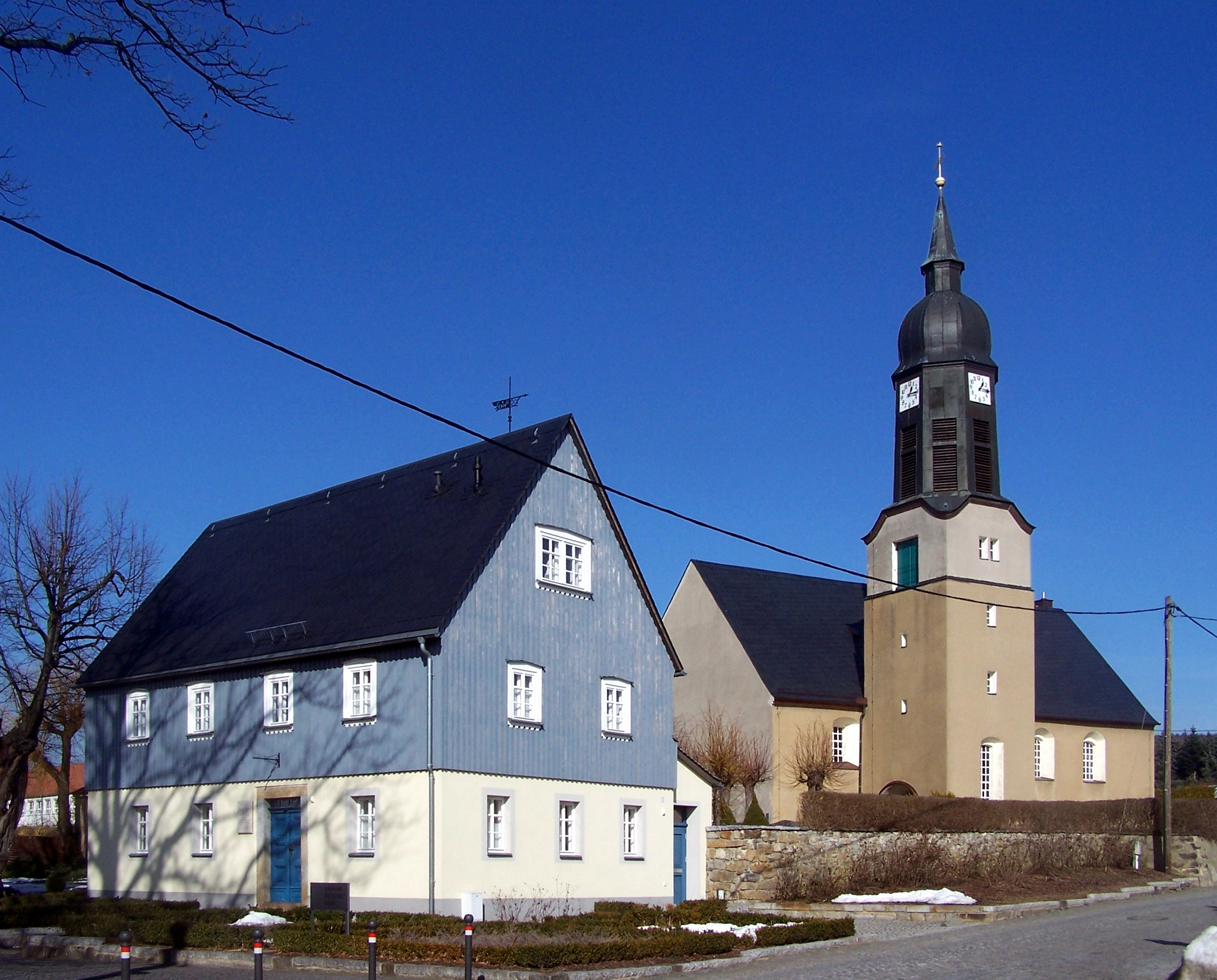 Gersdorf (Haselbachtal), Ensemble Kirche und Geburtshaus von Karoline Salome Rietschel, der Mutter des Bildhauers Ernst Rietschel